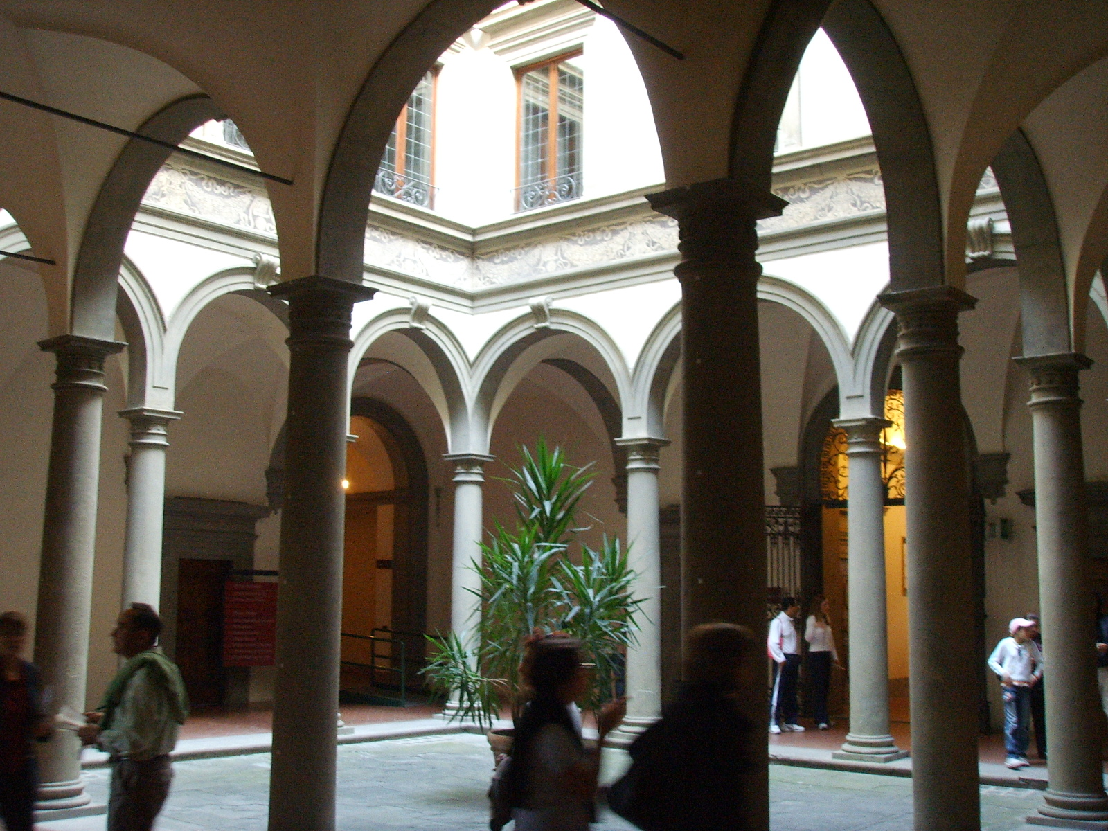 Palazzo niccolini, cortile